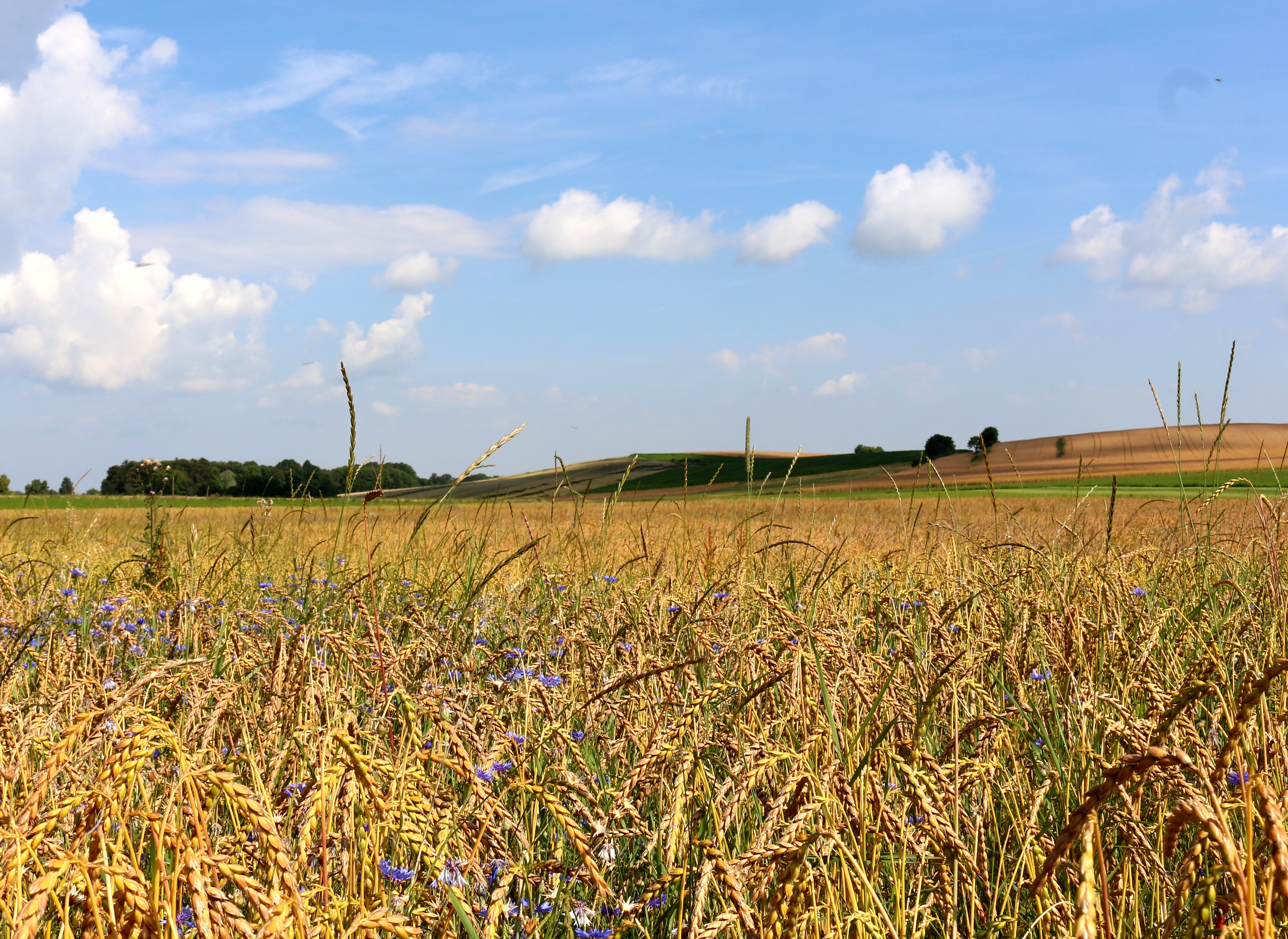 Am Landeskulturellen Wanderweg auf Erlinger Flur, Gemeinde Andechs